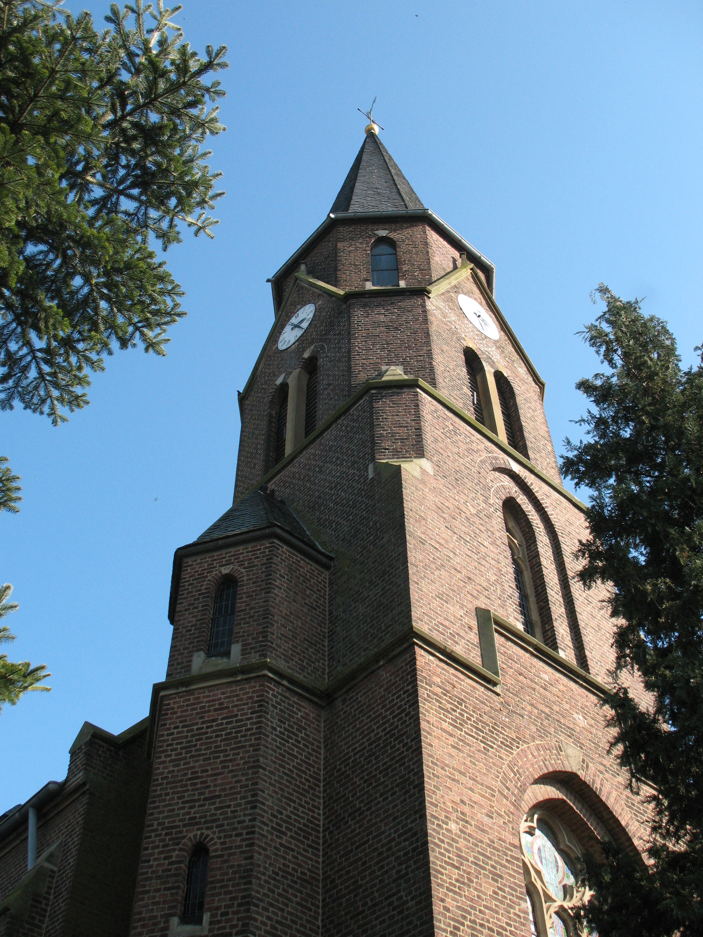 Kirchturm der Manheimer Kirche St. Albanus und Leonhardus von der Buirer Straße aus gesehen.